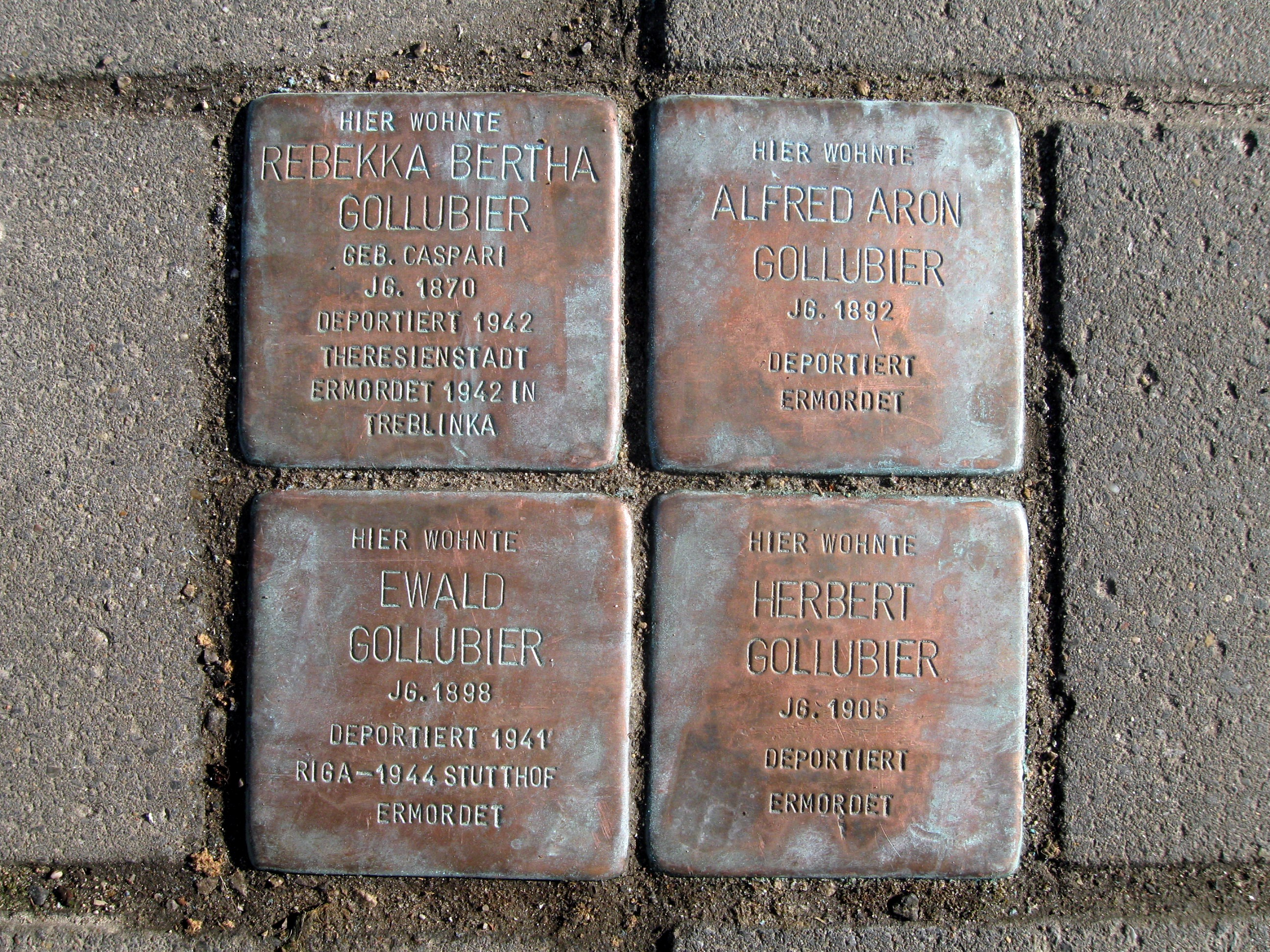 Stolpersteine in Dortmund, Schüruferstraße 221